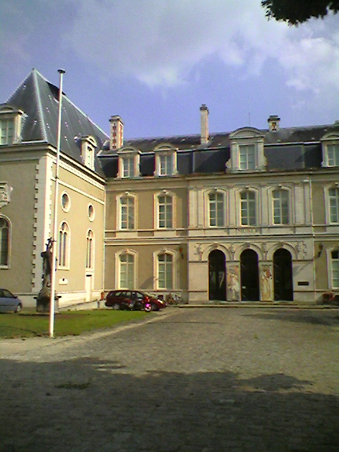 Le principal Musée de la ville du Mans